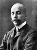 Josef Siben (1864-1941) aus Deidesheim, Rheinpfalz, Bayerischer Landtagsabgeordneter